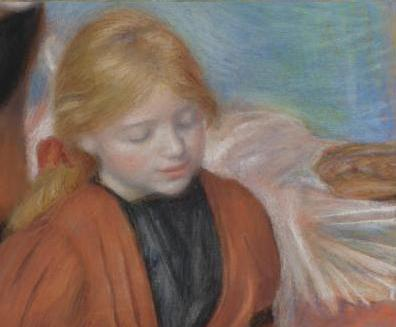 La Lecture (pormenor)